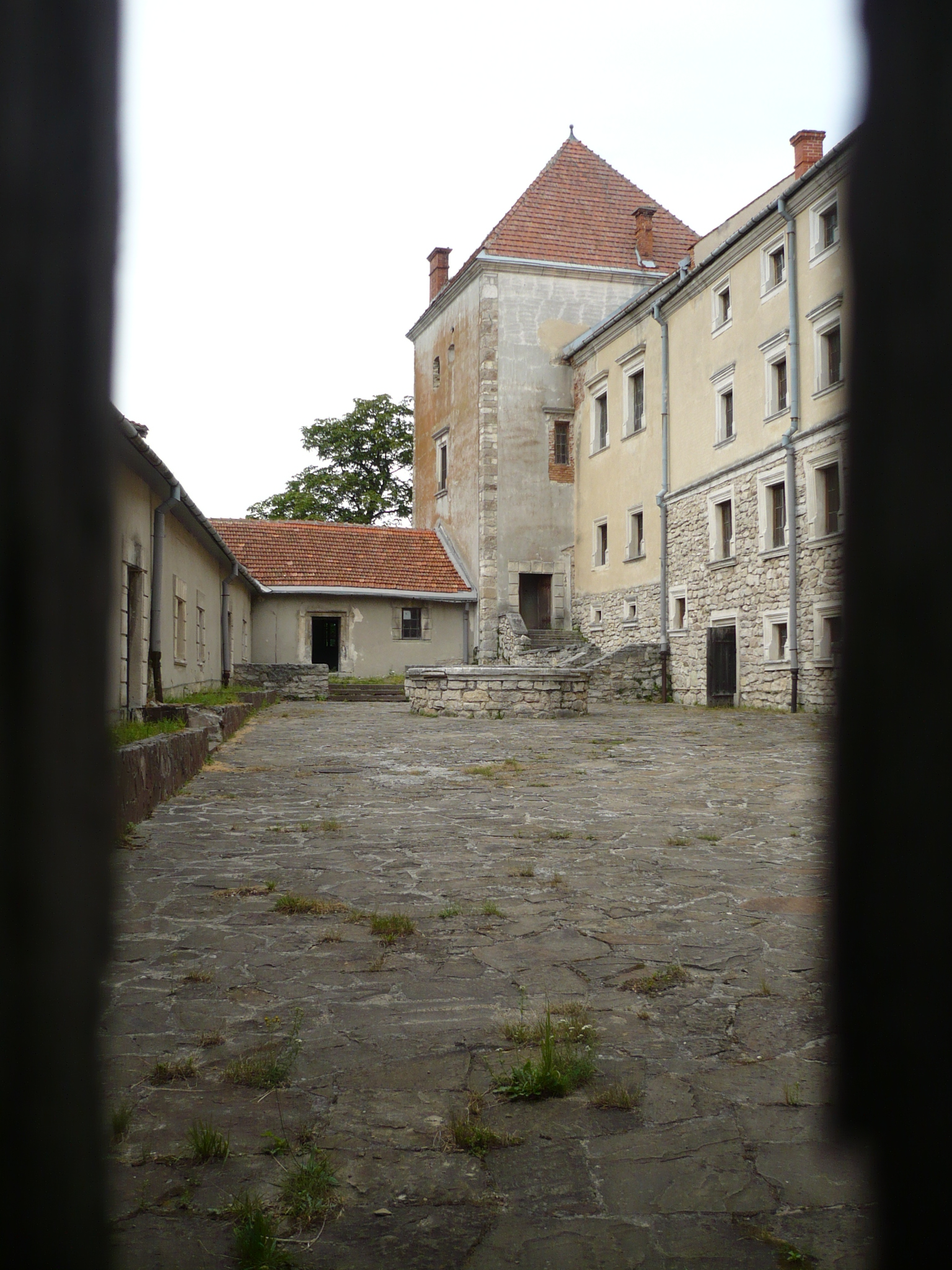 Dziedziniec zamku w Świrzu na Ukrainie. Zamek stanowił pierwotnie własność książąt Świrskich, od XVII wieku należał do rodu Cetnerów, zniszczony podczas wojen kozackich w 1648, zdobyty przez Turków w 1672. Po pierwszym rozbiorze Rzeczypospolitej znalazł się na obszarze zaboru austriackiego. Ostatnimi właścicielami przed 1939 byli Irena z Lamezanów i jej mąż Tadeusz Komorowski, późniejszy dowódca Armii Krajowej i powstania warszawskiego